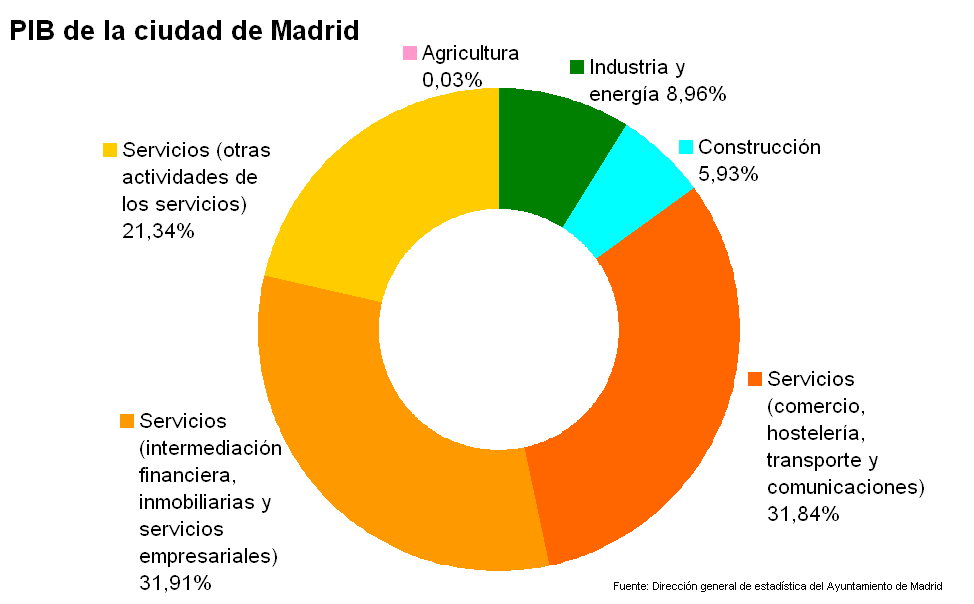 PIB de la ciudad de Madrid en el año 2003. Fuente de los datos[1] La gráfica es un trabajo propio.